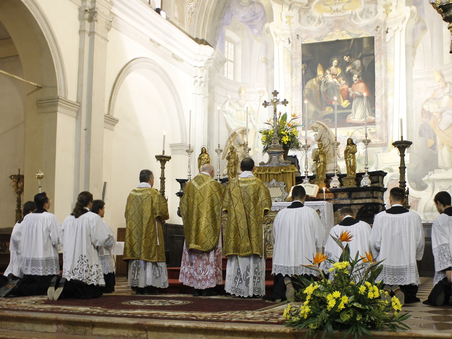 Santa messa solenne in rito antico celebrata nella chiesa di S. Ambrogio